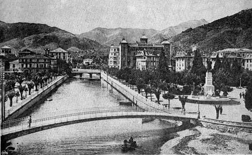 Il torrente Boate in una fotografia di fine Ottocento e inizio Novecento, Rapallo, Liguria, Italia